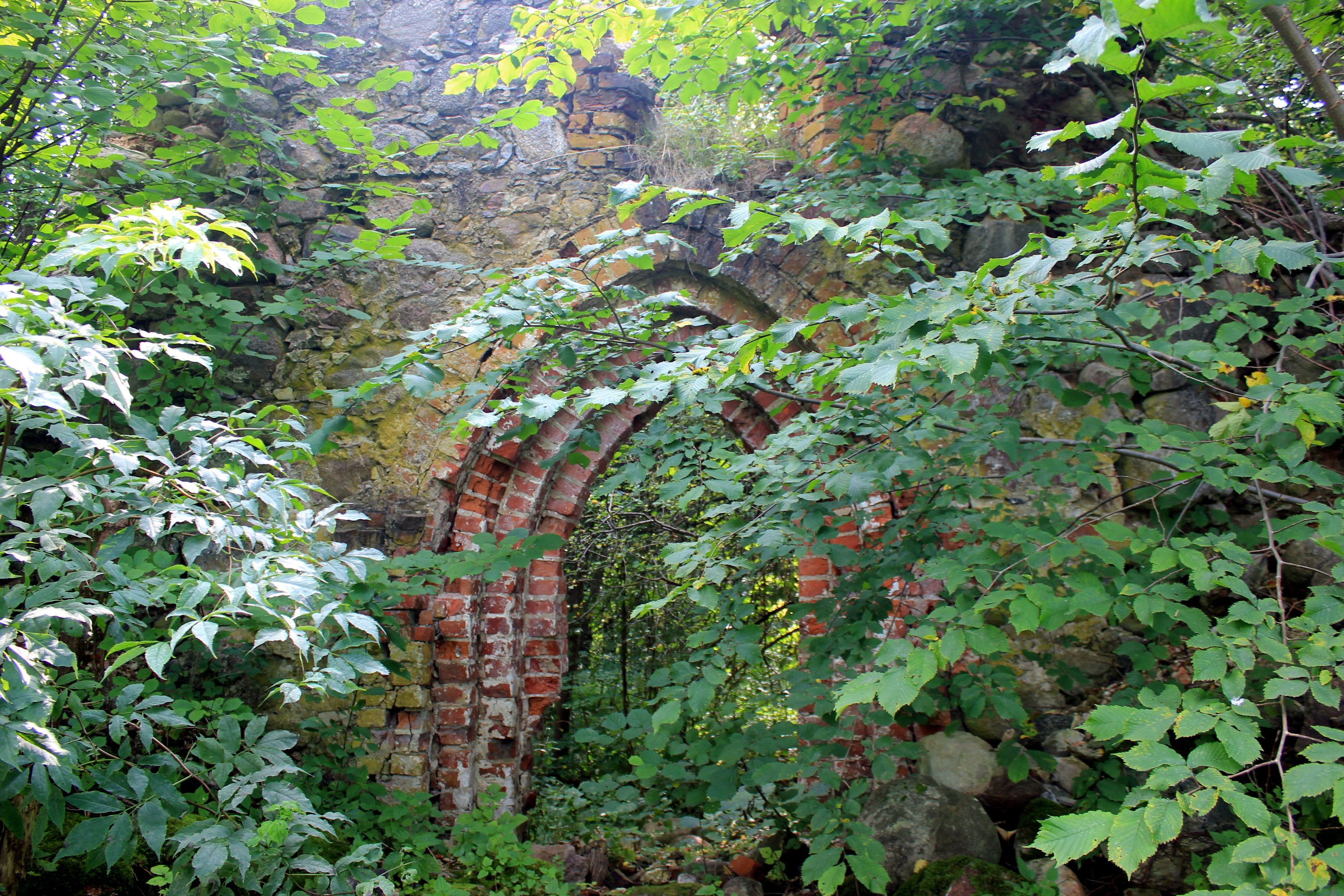 Überbleibsel der Kirche Medenau in Logwino, Kaliningrader Oblast.